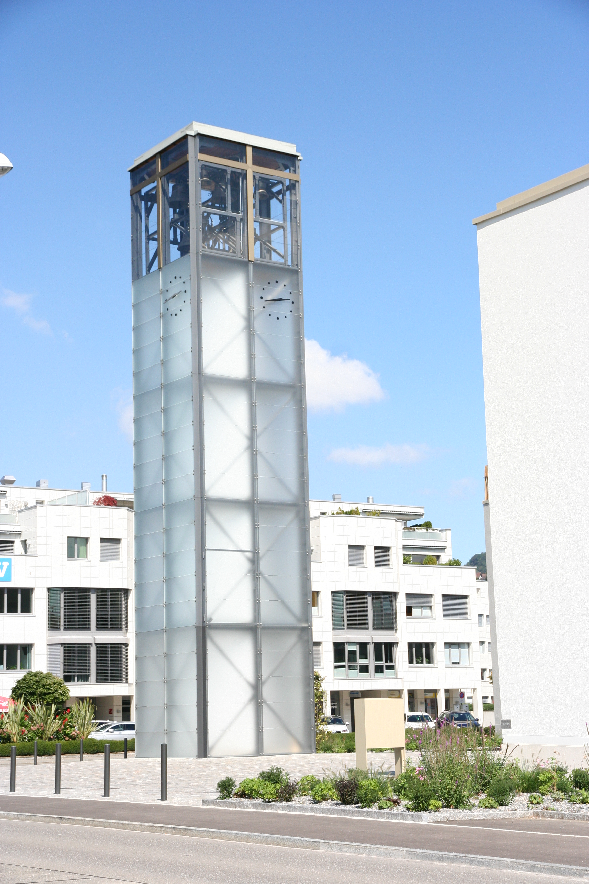 röm.-kath. Kirche St. Mauritius Bonstetten vom 2016